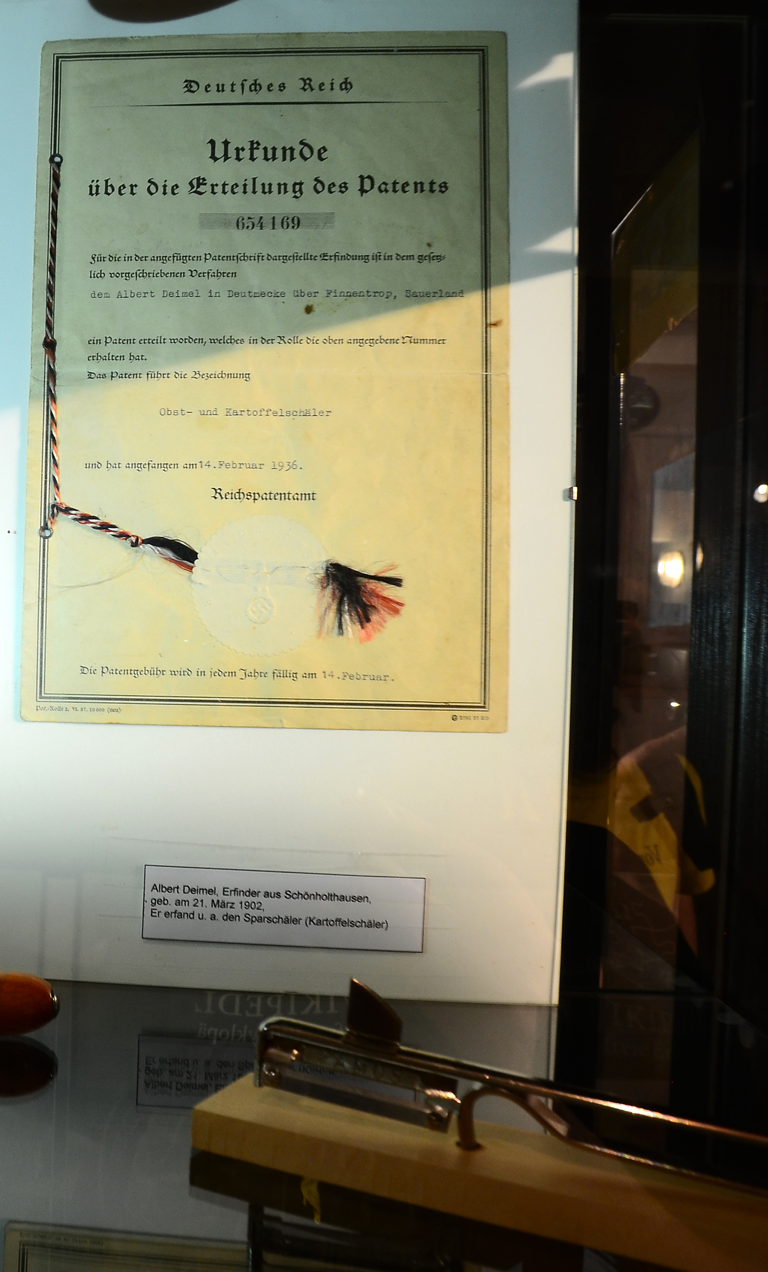 Patenturkunde von 1936 des ersten Sparschälers mit längsliegendem Messerkopf zum Griff, Erfinder Albert Deimel, im Vordergrund das Modell, Museum "Heimatstube" Schönholthausen, Zur Schlerre 2, Finnentrop